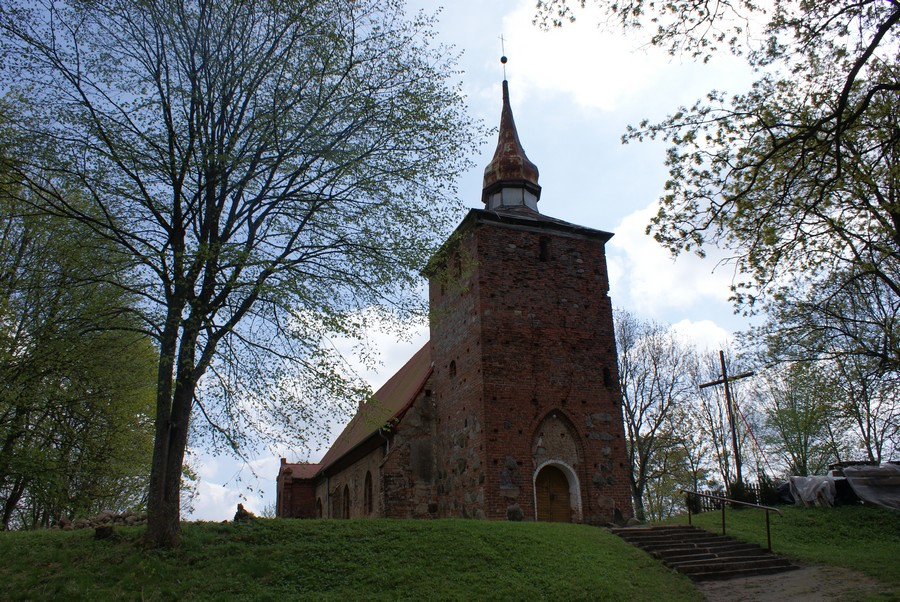 Świelino, kościół filialny p.w. św. Piotra i Pawła